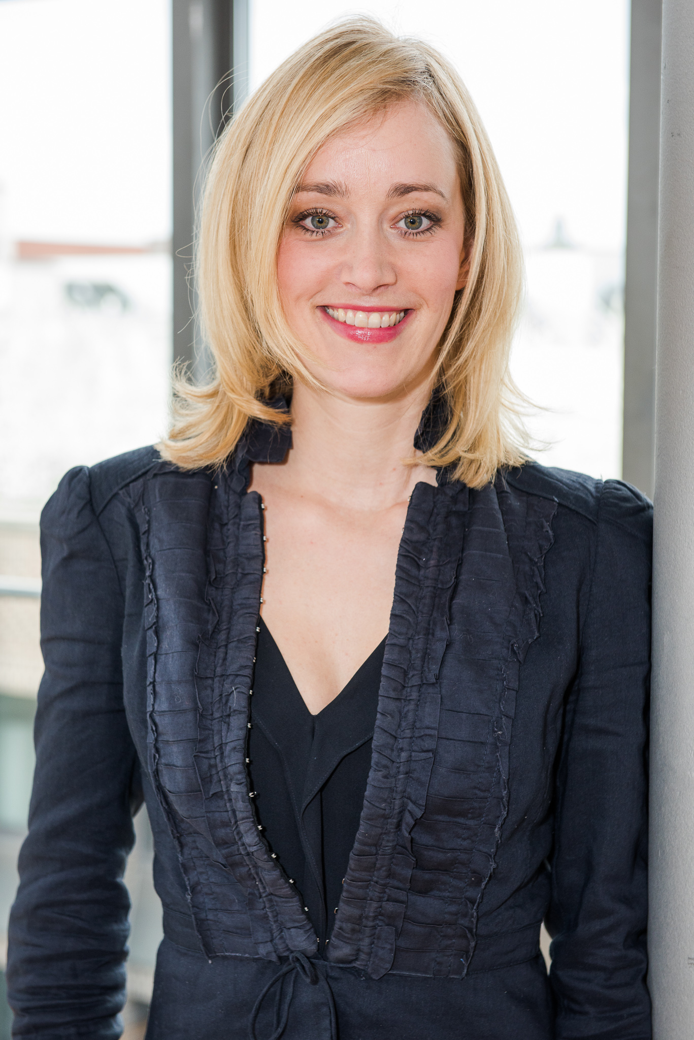 BR,Bayerischer Rundfunk,Bayerisches Fernsehen,Filmbrunch 2015,Judith Richter